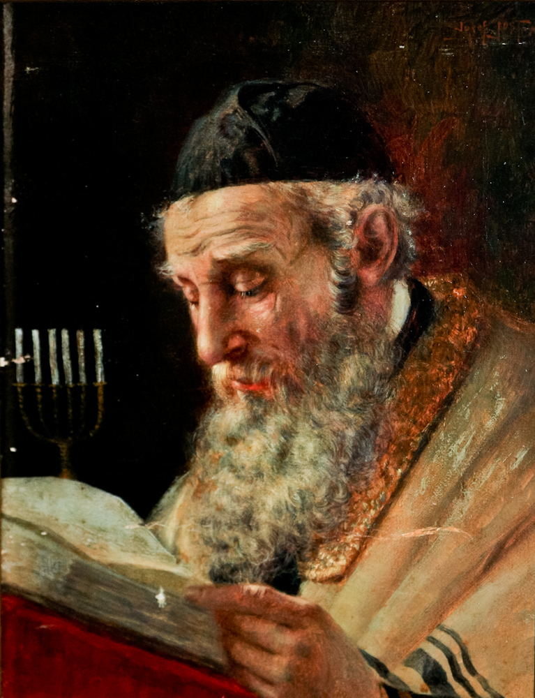 Раввин неизвестного автора